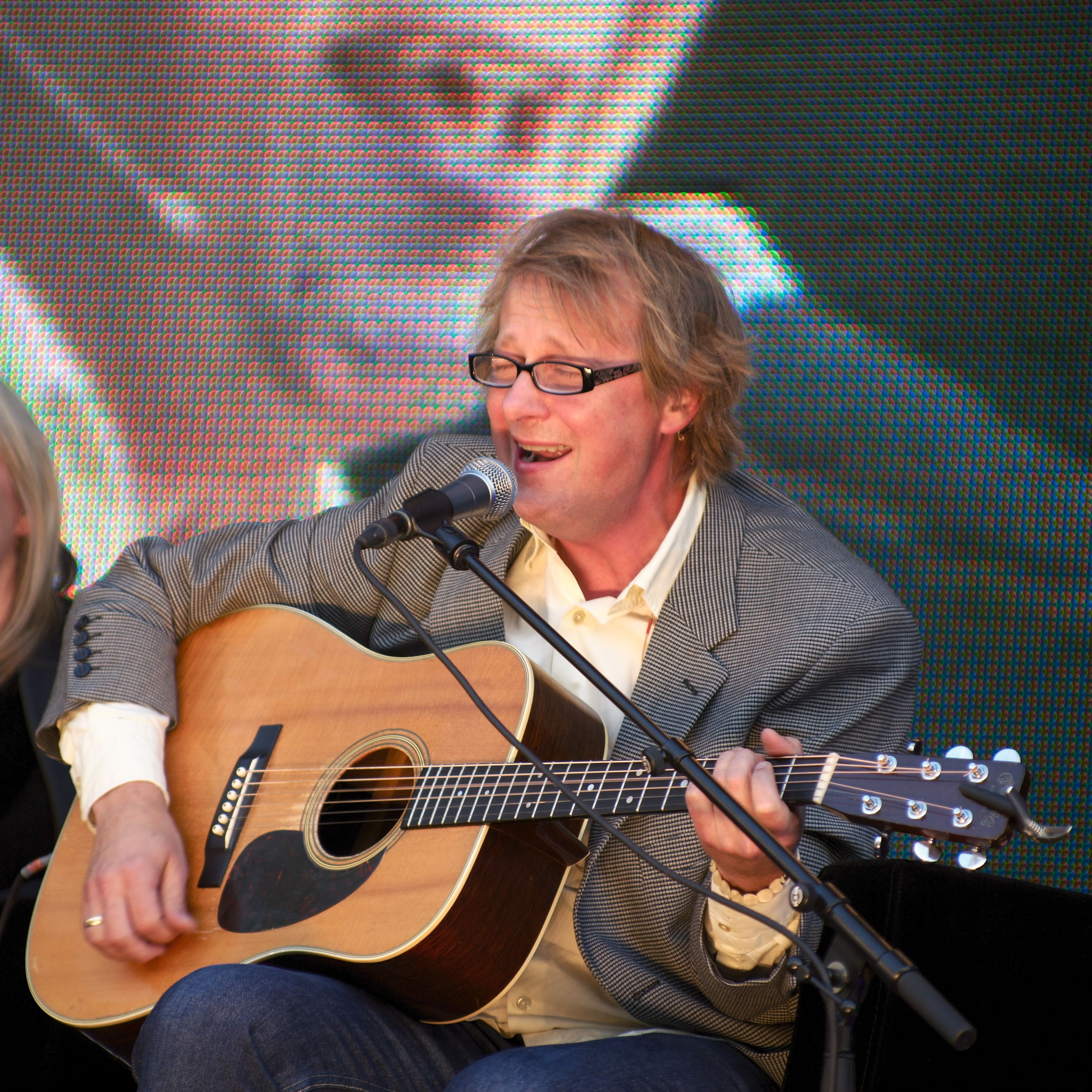 Lars Lillo-Stenberg at Oslo bokfestival 2012